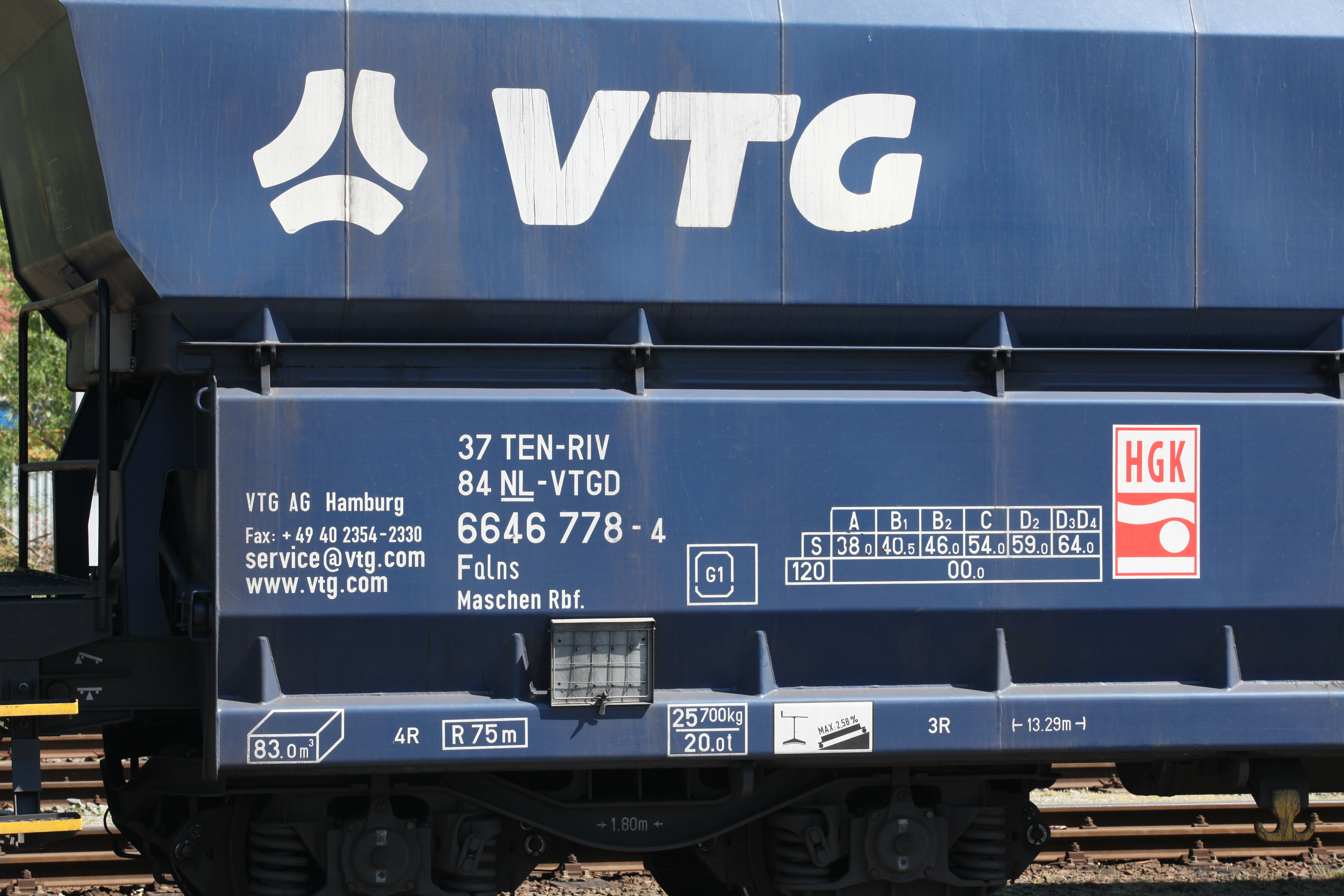 VTG Falns